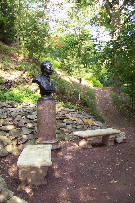 Judeichbüste am neuen Standort im Forstbotanischen Garten Tharandt